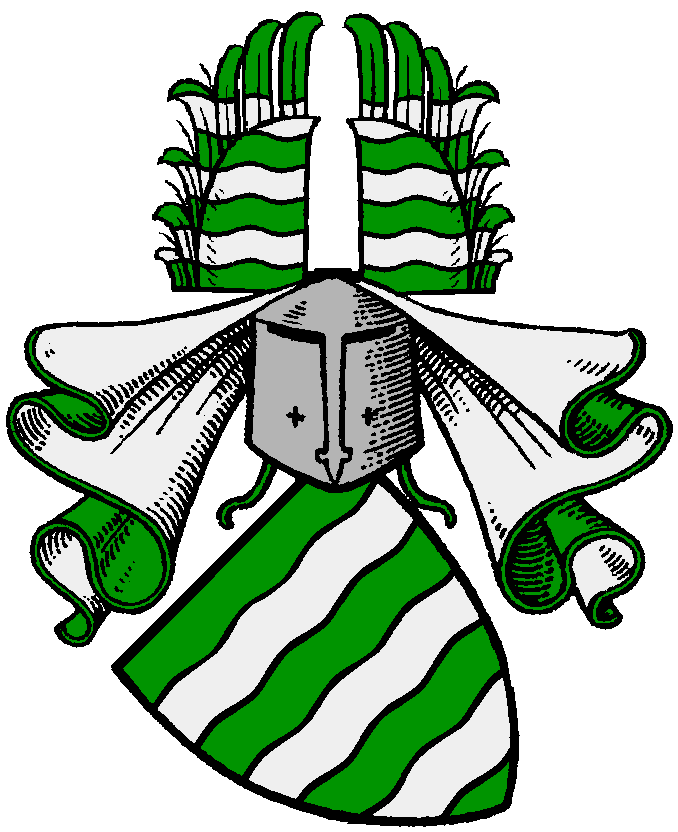 Wappen der von und zu Gilsa (Hessisches Adelsgeschlecht)